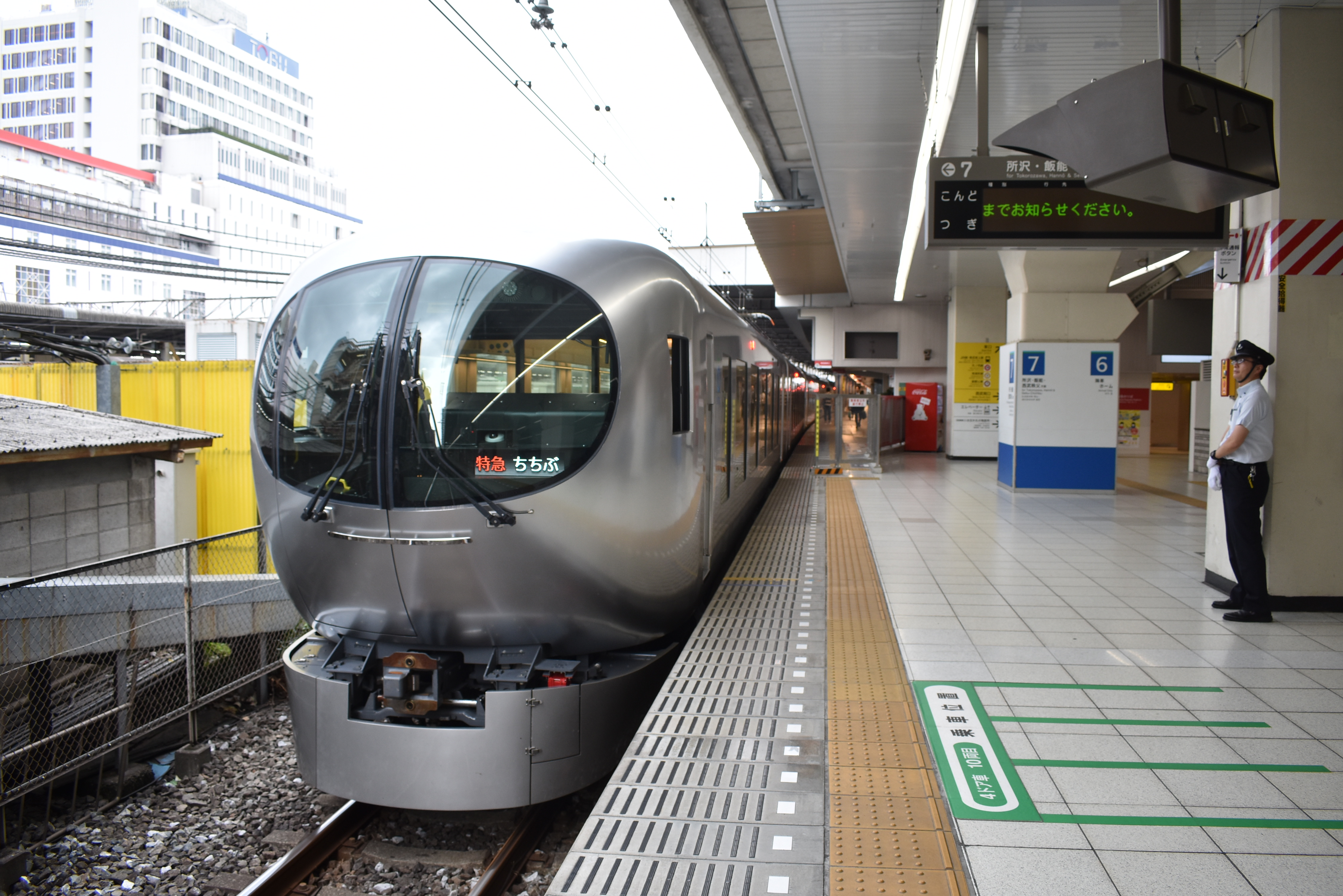 西武001系電車